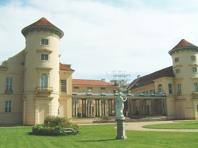 Schloss rheinsberg with french garden